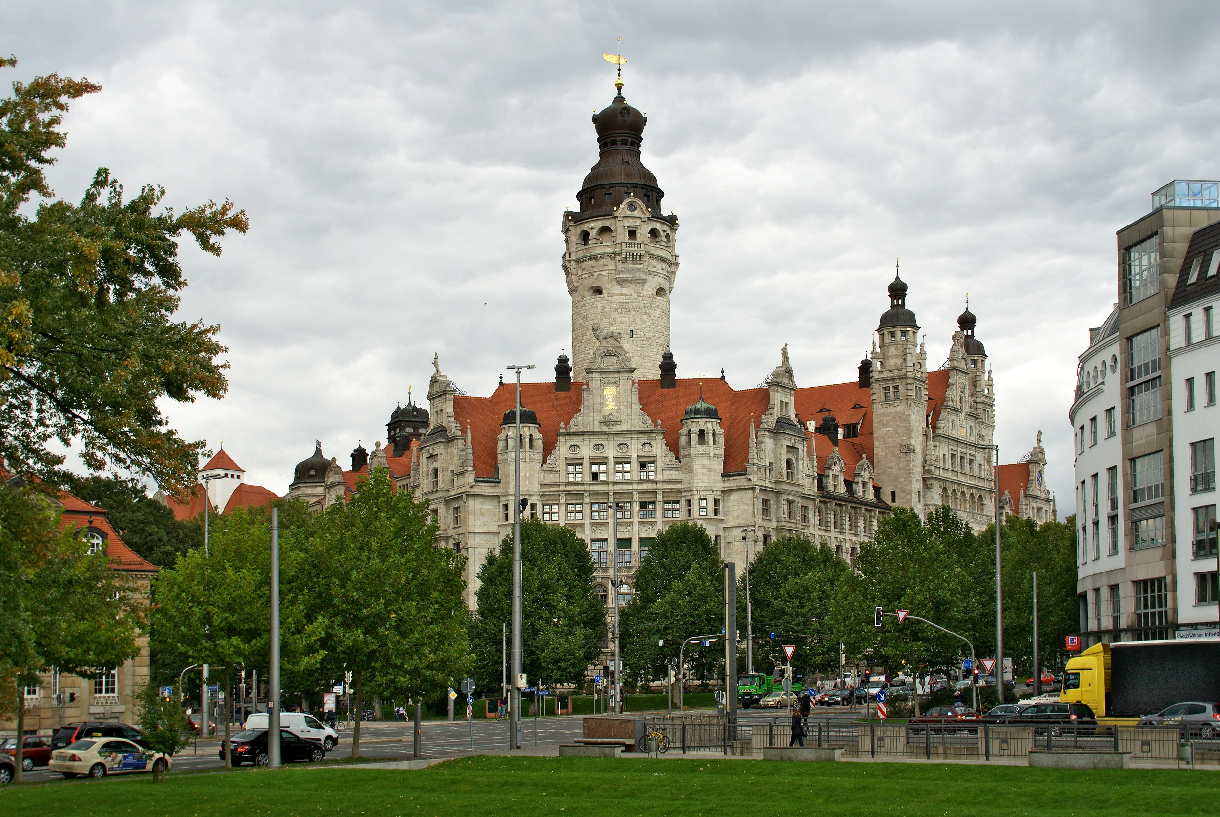 Neues Rathaus in Leipzig